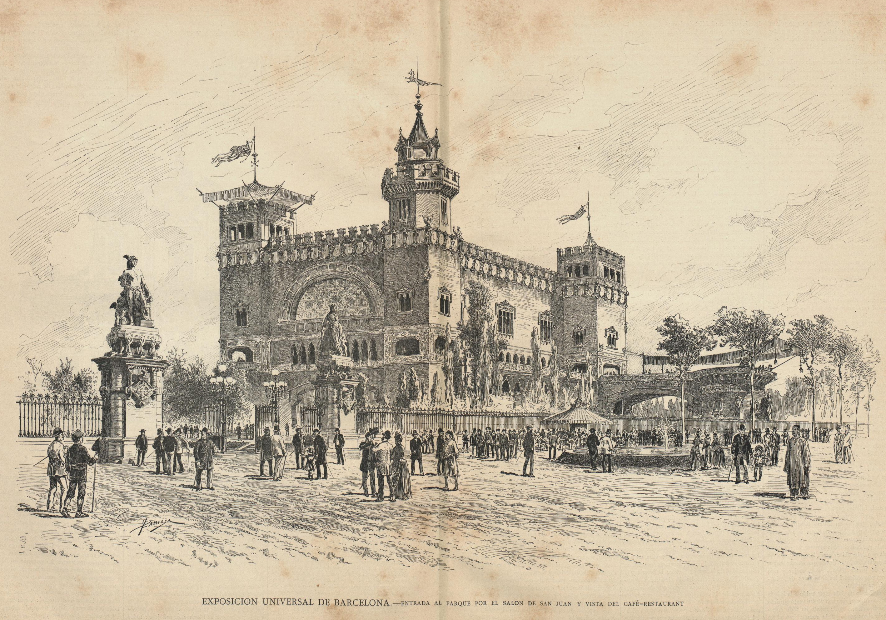 Exposición Universal de Barcelona — Entrada al parque por el Salón de San Juan y vista del Café-Restaurant.